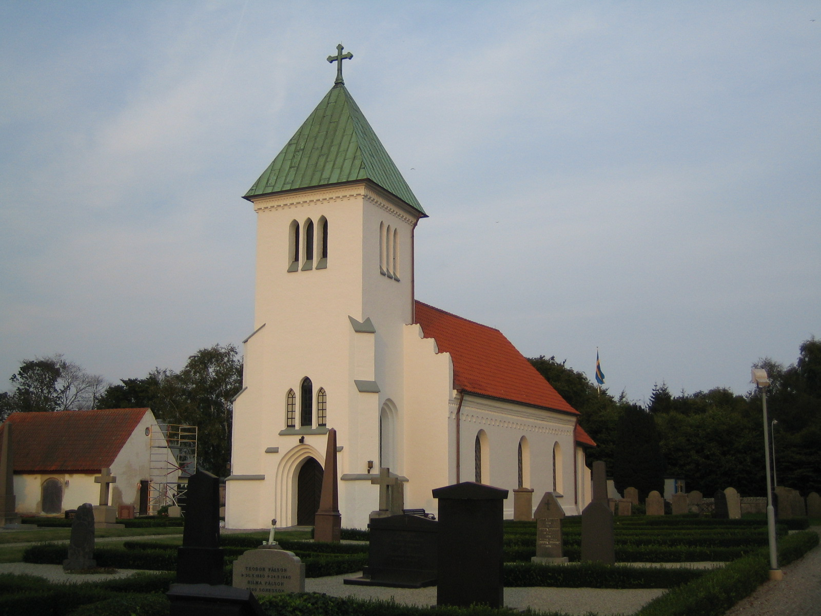 Hemmesdynge kyrka